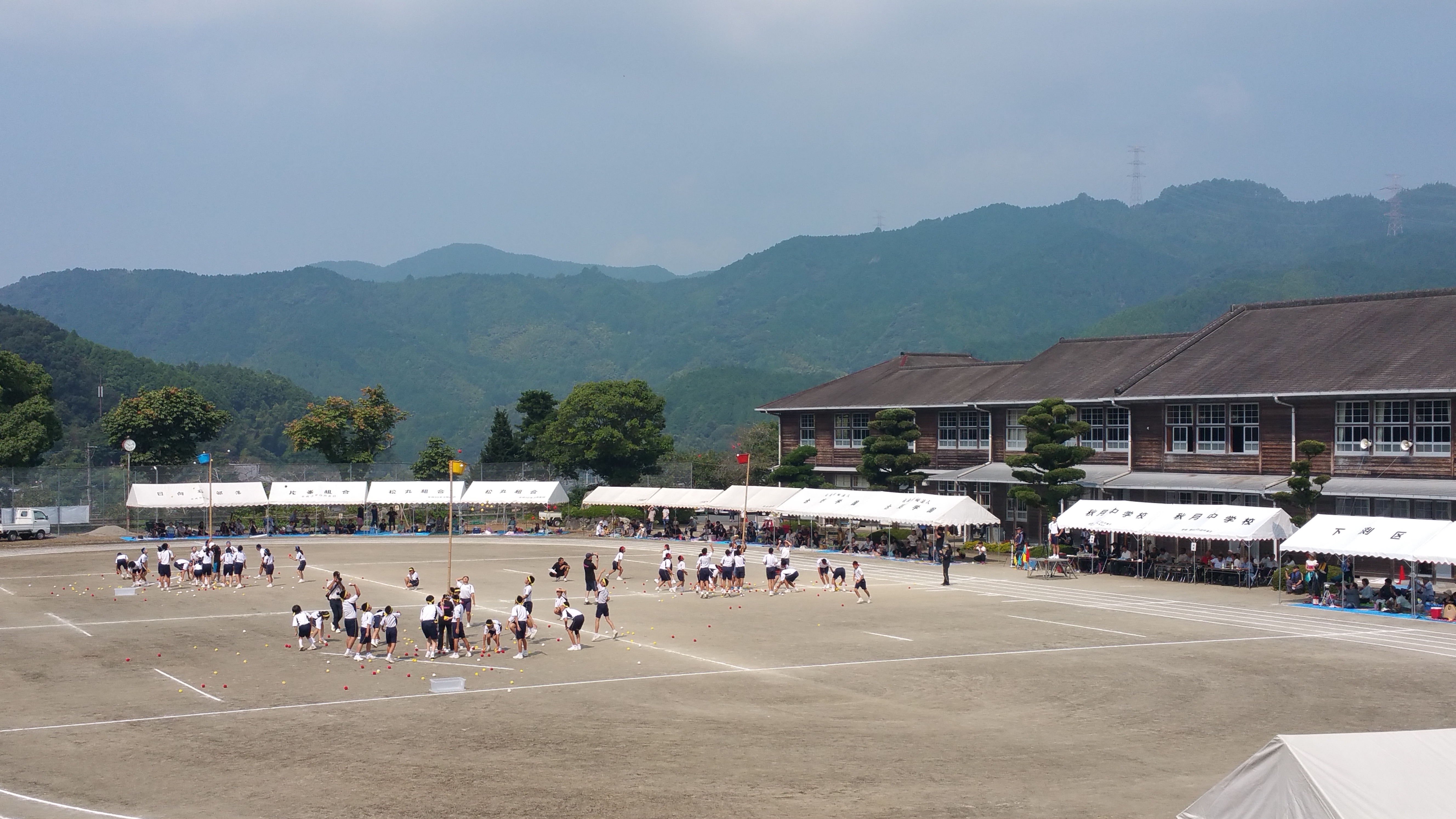 中学校体育祭での玉入れ